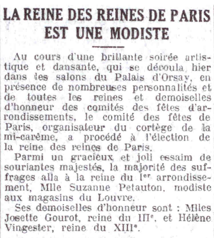 Annonce de l'élection de la Reine des Reines 1929